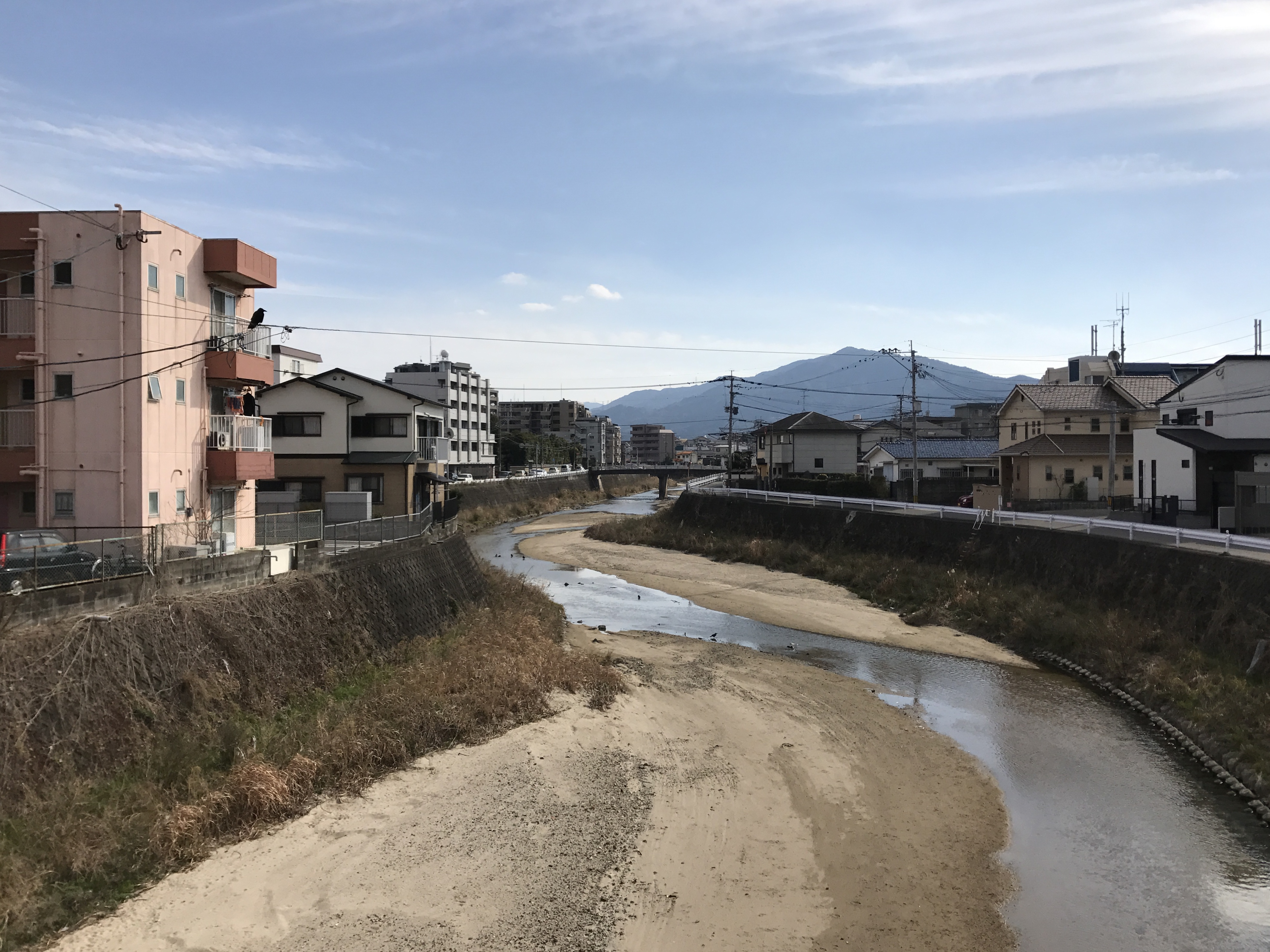 金桜橋より望む樋井川(上流側)